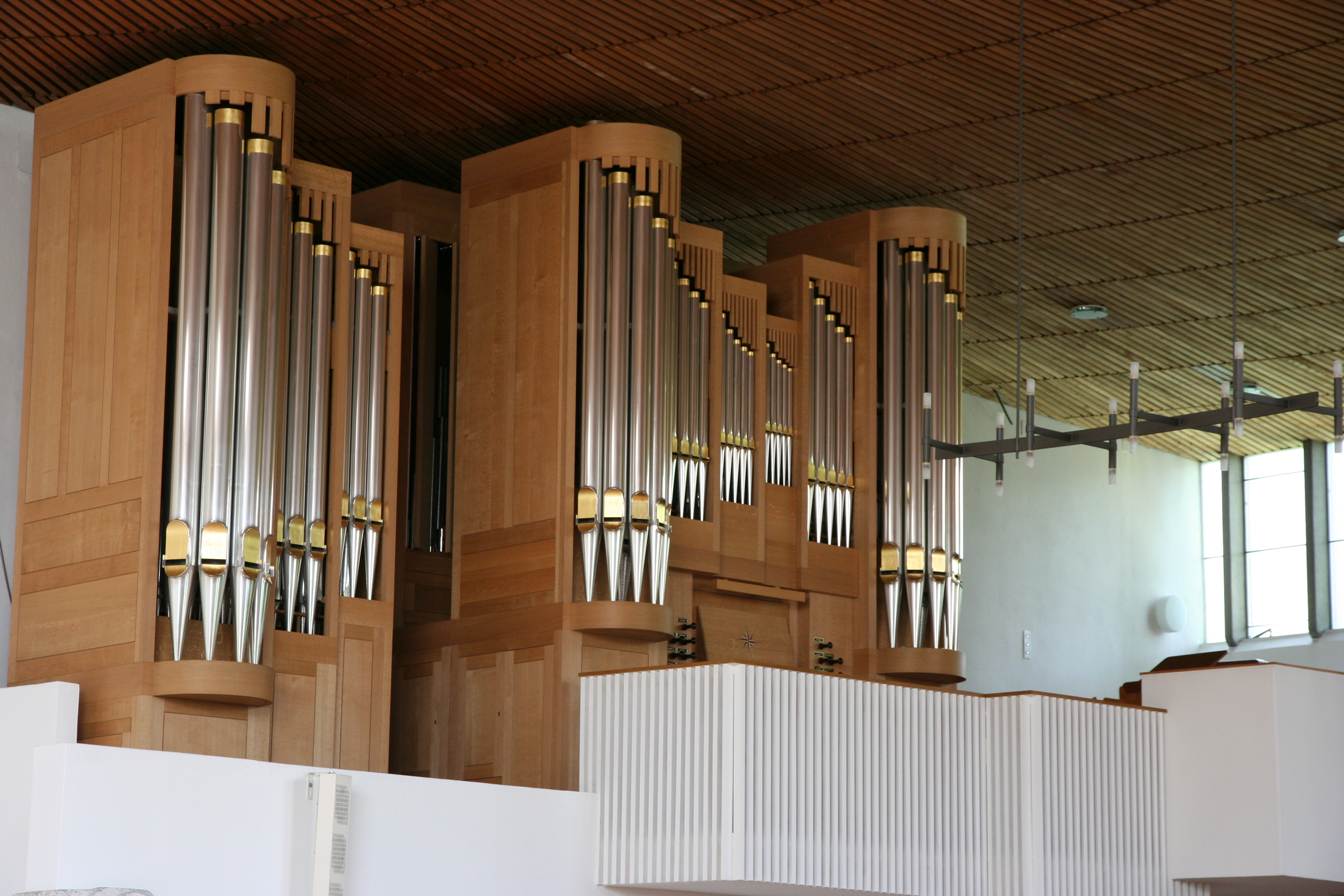 Römisch-katholische Pfarrkirche St. Christophorus Wangen an der Aare